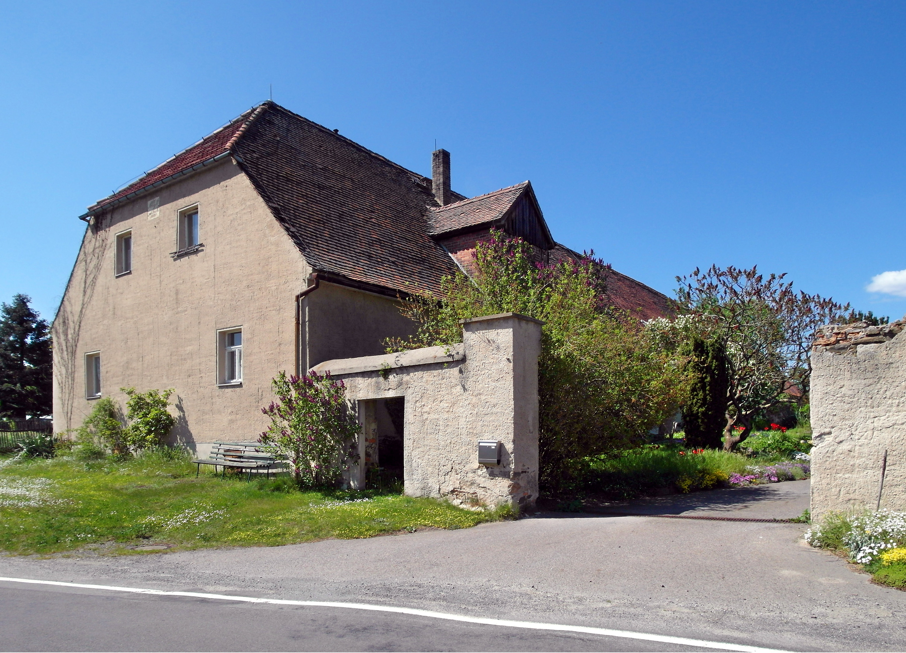 09.05.2016 02994 Bulleritz (Gemeinde Schwepnitz): Ehem. Vorwerk Bulleritz, Hauptstr. 4. Wohntrakt im SW an der Straße. Caspar Burggraf von Dohna wurde 1565 mit dem Dorf Bulleritz belehnt. 1817 erwarben die Grafen zu Stolberg-Stolberg auf Brauna das Vorwerk, welches zum Ritterguts erhoben wurde. Der Wohntrakt ist zur Straße gerichtet. Er wurde 1821 von der Herrin auf Brauna, Sophie Charlotte Eleonore Gräfin zu Stolberg-Stolberg, erneuert, was eine Tafel am Giebel mit der Inschrift "K. E. Gr. z. St. geb. Gr. v. R. 1821" bezeugt. 1945 nutzte Rote Armee das Gut zur Schweine- und Rinderhaltung. Danach wurde d. Vorwerk Betriebsteil des Volksgutes Koitzsch und man betrieb Hühnerzucht. Die Firma Straßen- und Wegebau, die das Objekt 1990 erworben hatte, ging in Insolvenz. Der Hof wirkt heute verlassen, nur der Wohntrakt am Hoftor zeugt von Leben und ist gepflegt. [SAM5839.JPG]20160509670DR.JPG(c)Blobelt